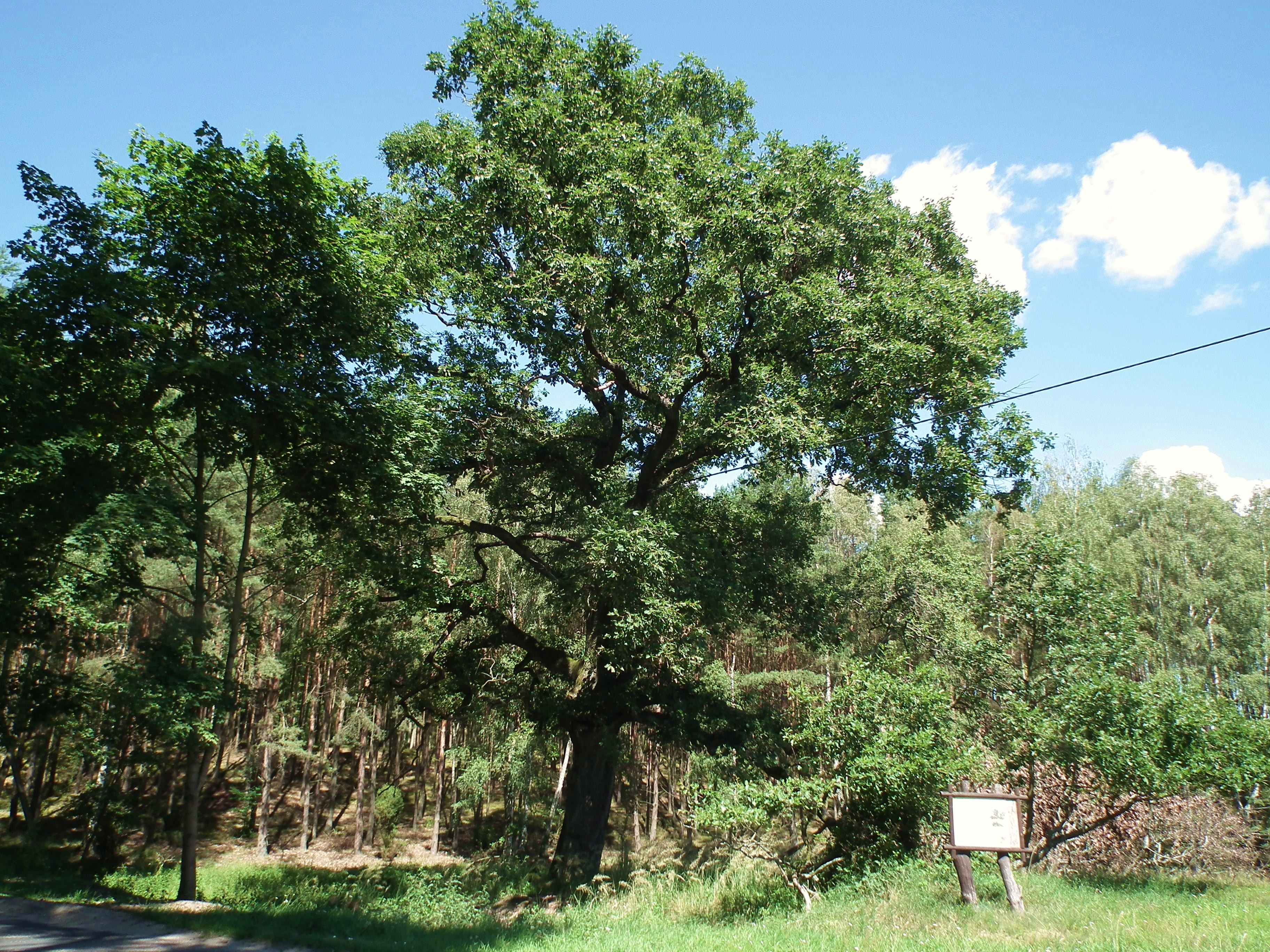 Pomnikowy dąb w Bachorzu - obw. 395 cm. wg tablicy in situ.